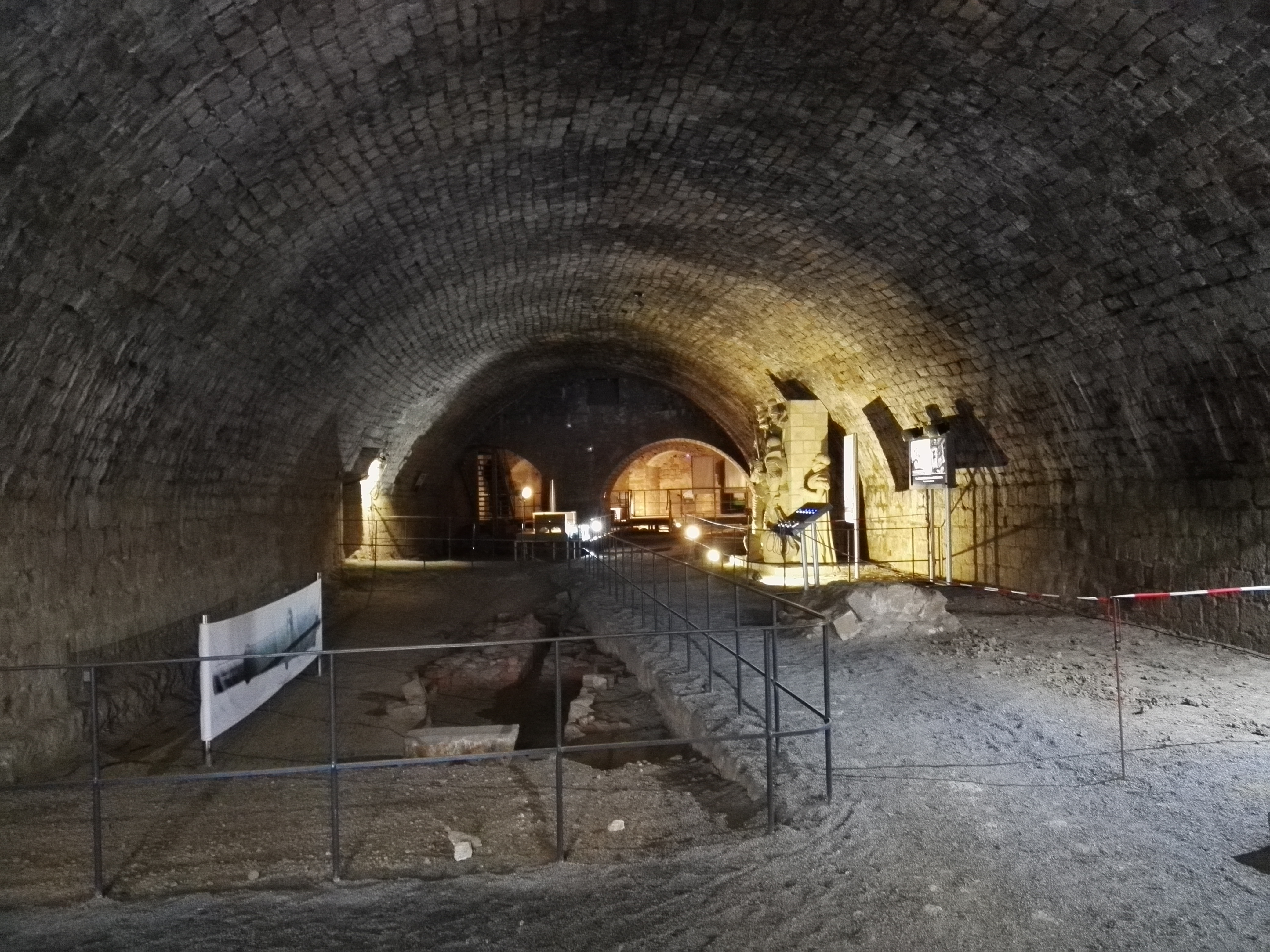 Museum Festung Dresden; innen; im Hintergrund das originale Moritzmonument